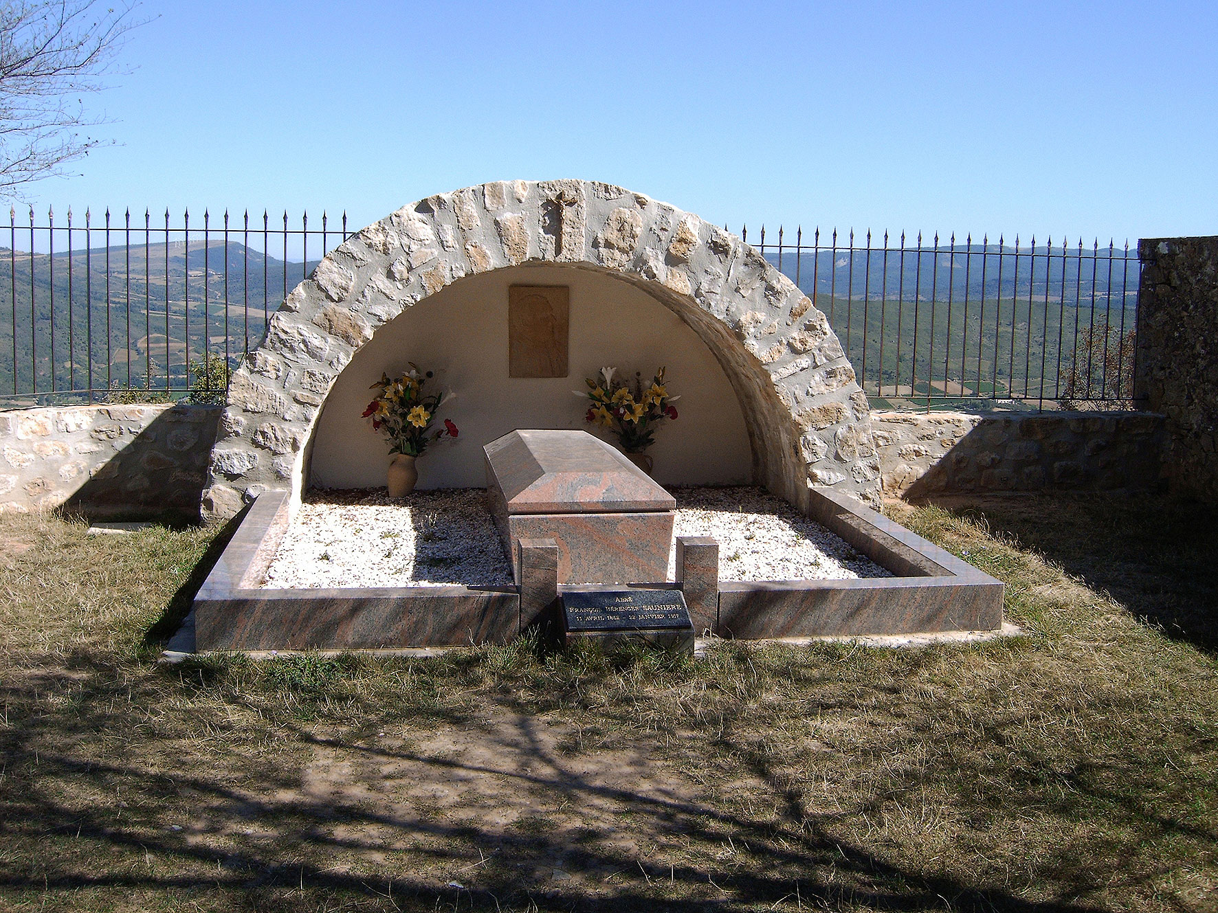 Rennes-le-Château (Aude, France) - Tombe de l'Abbé Saunière.